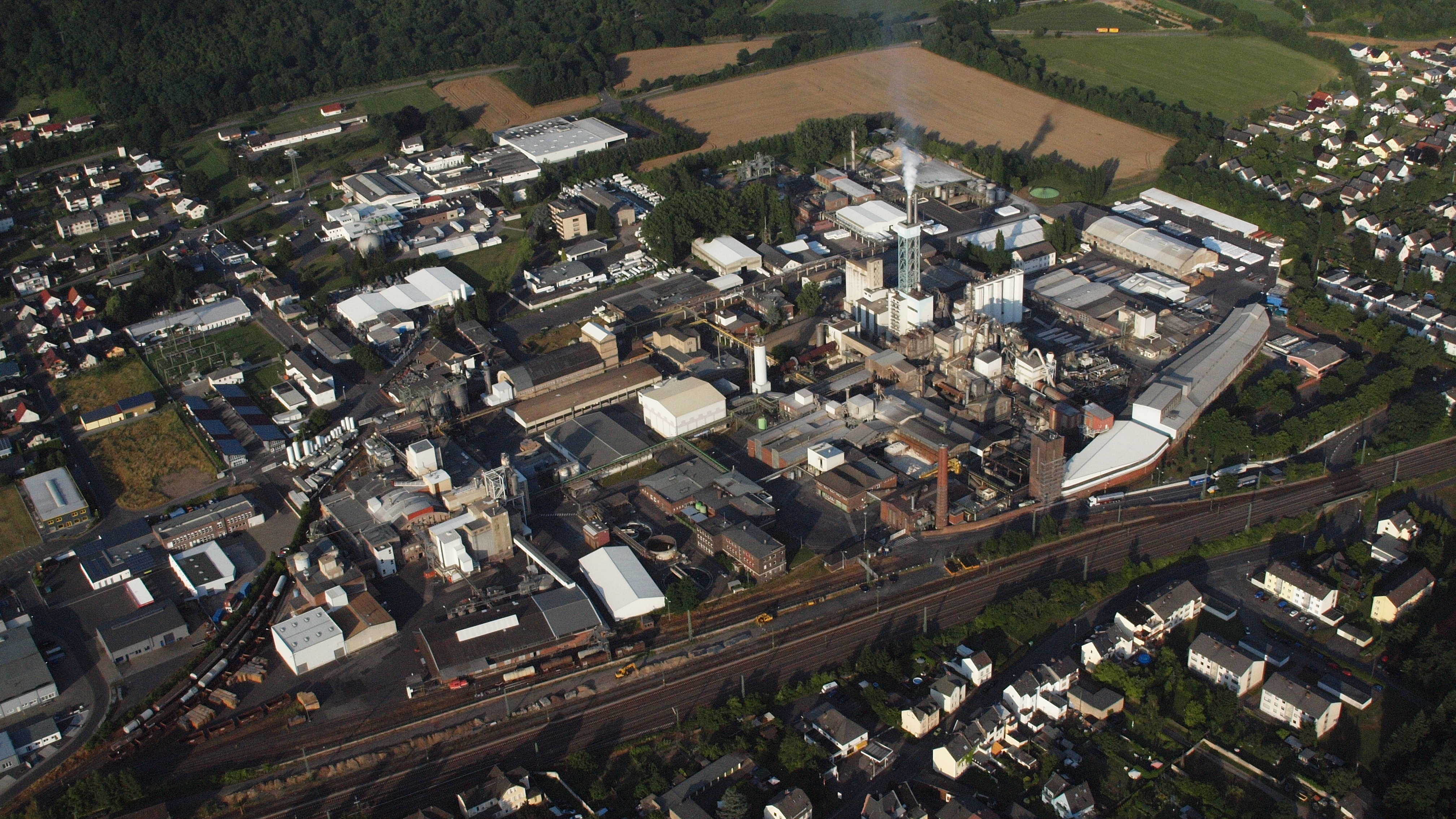 Bad Hönningen, Solvey GmbH: Luftaufnahme